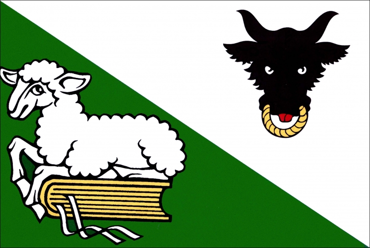 vlajka, ,Spělkov okres Žďár nad Sázavou